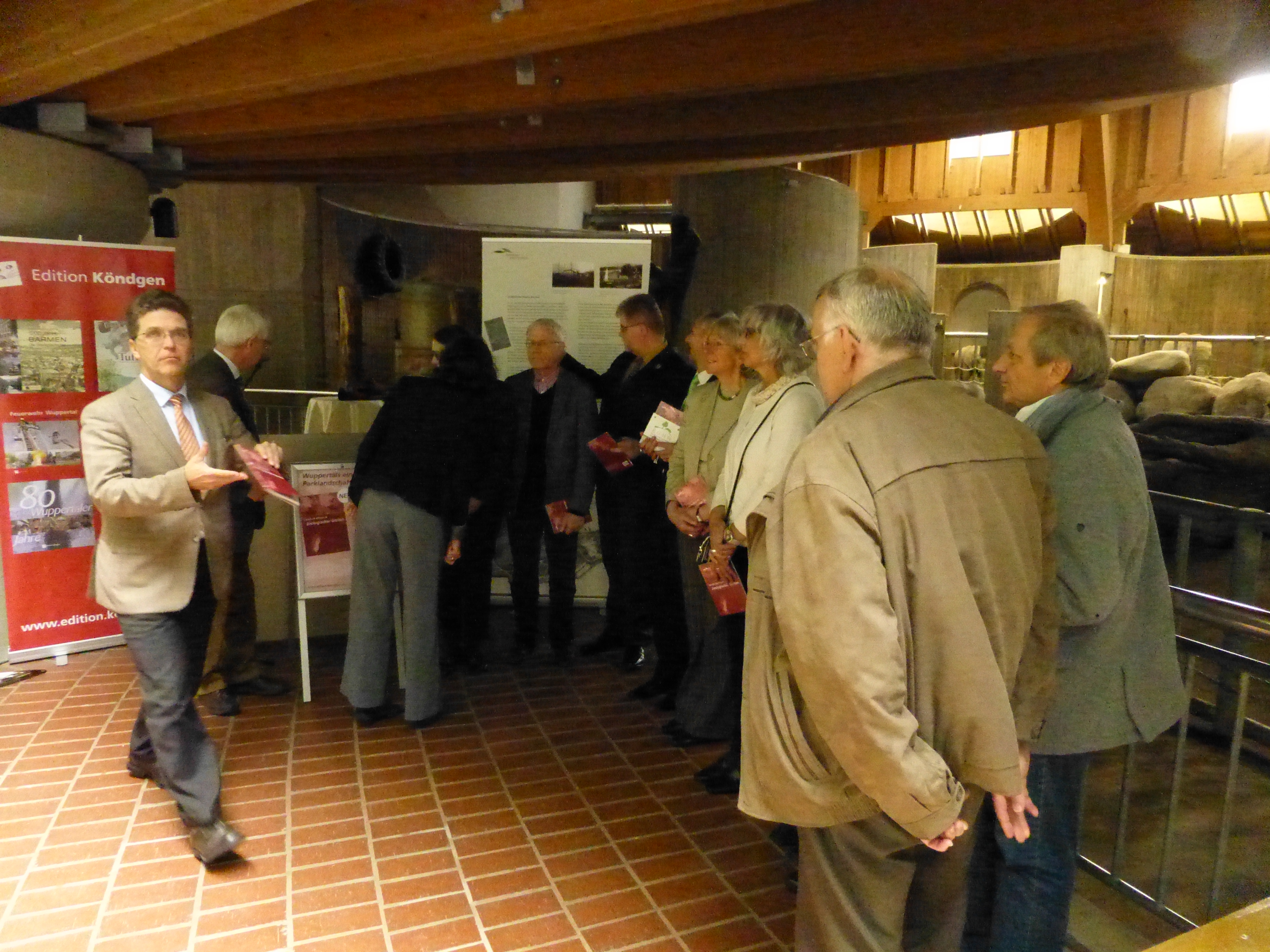 Der Wuppertaler Zoo bekam am 20. September 2013 die EGHN-Plakette (Europäisches Gartennetzwerk) verliehen, zu diesem Anlass wurde ein weiterer Band aus der Reihe Wuppertals grüne Anlagen: „Landschaftspark Zoologischer Garten“ vorgestellt. Die öffentliche Veranstaltung fand im Elefantenhaus statt. Im Bild